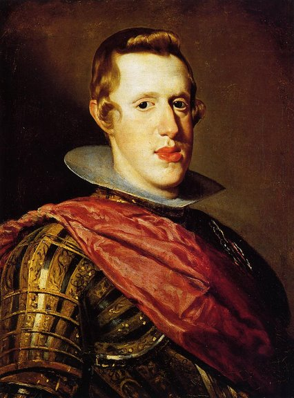 Retrato del rey Felipe IV de España (1601-1665), que fue hijo del rey Felipe III de España y de la reina Margarita de Austria.